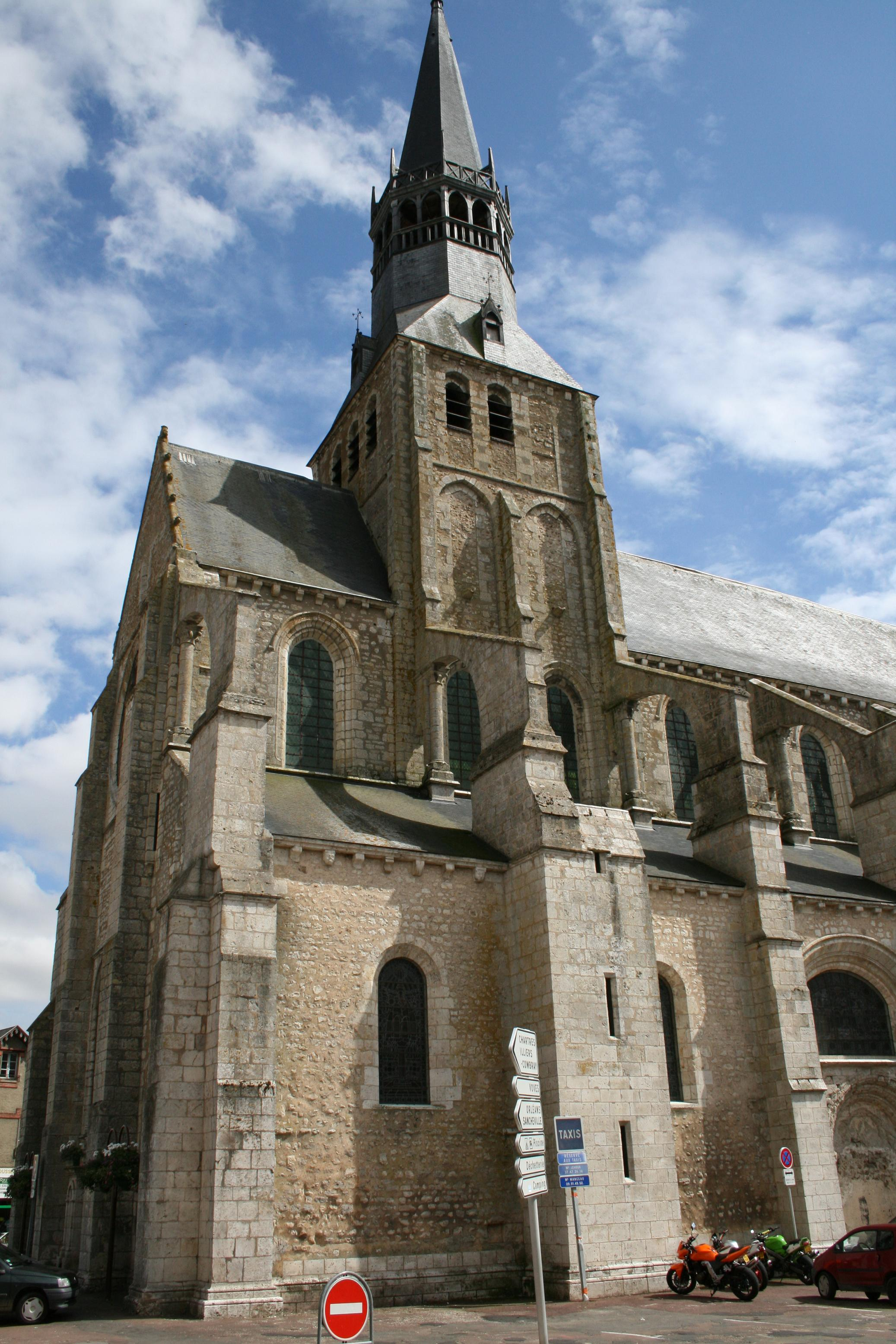 Eglise Notre-Dame - Bonneval (Eure-et-Loir)